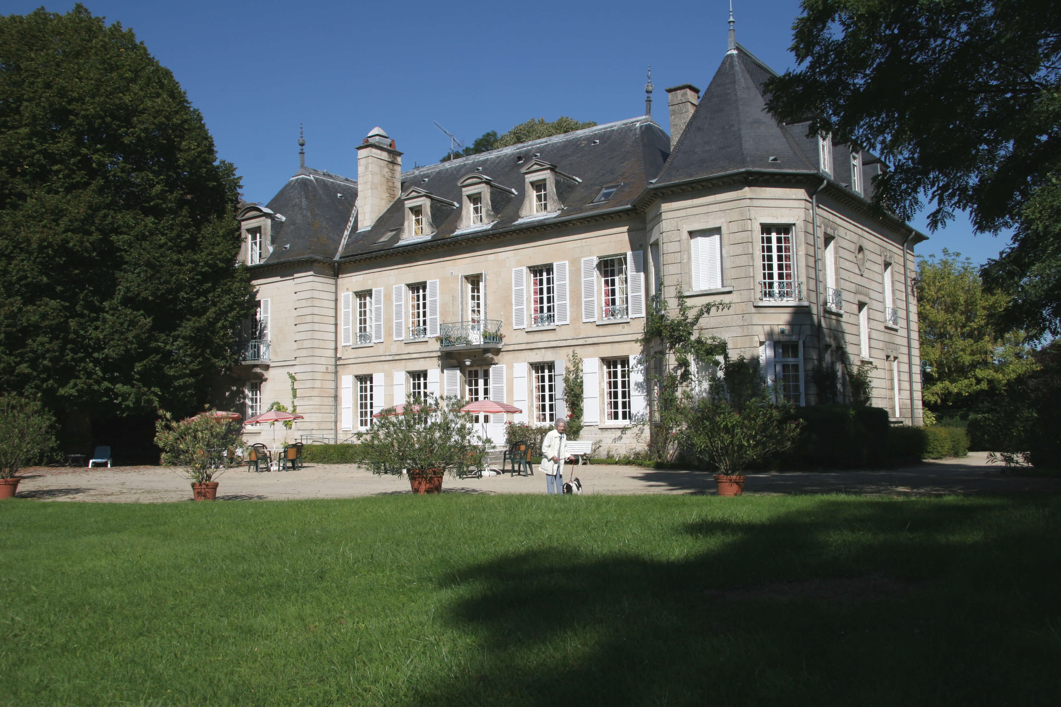 Château de Thurier, Vic-sur-Aisne